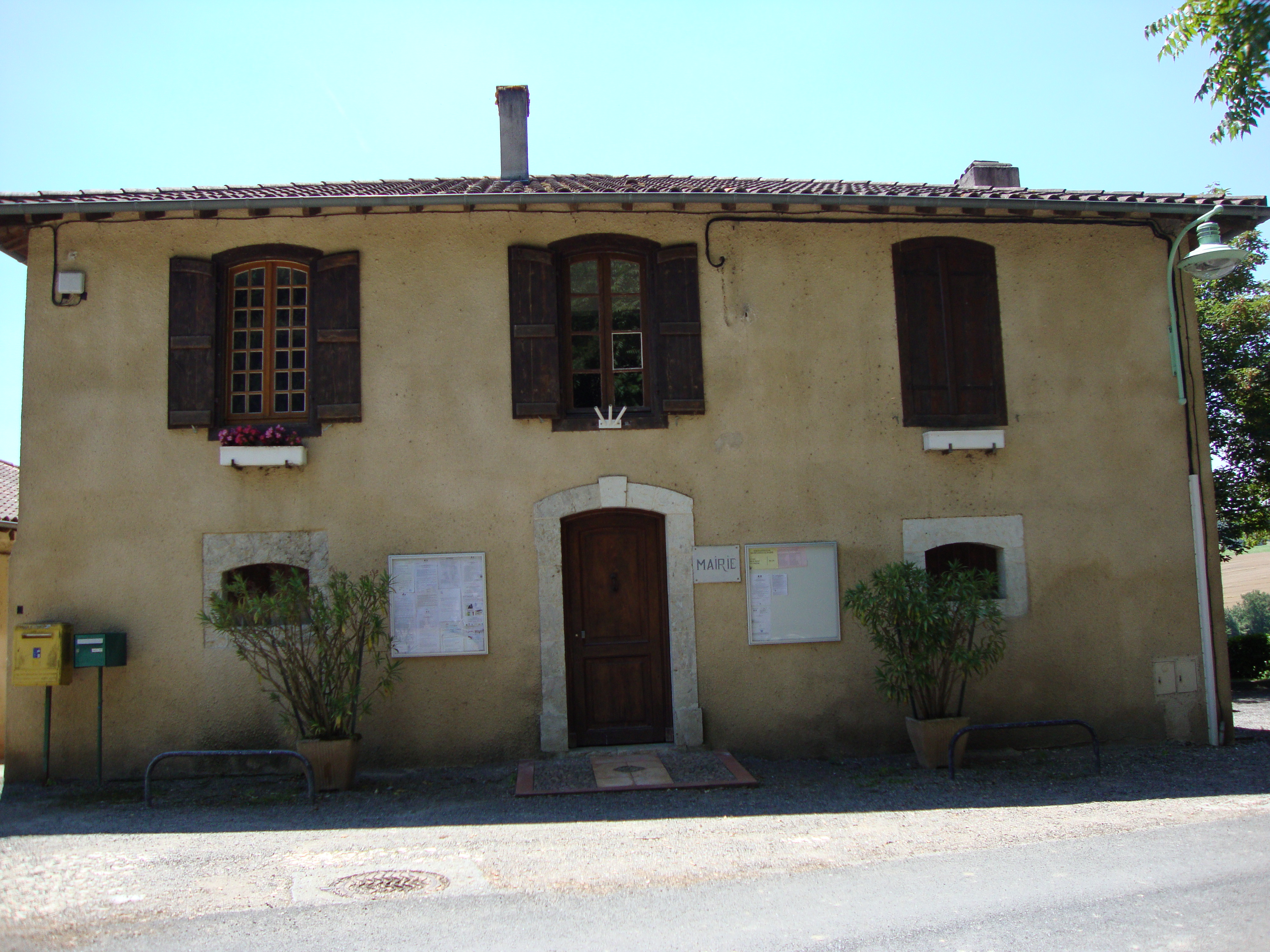 Lussan (Gers, Fr) mairie